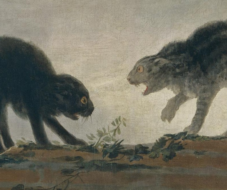 detailCartones para tapices.